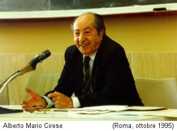 L'anthropologue italien Alberto Mario Cirese à Rome en 1995